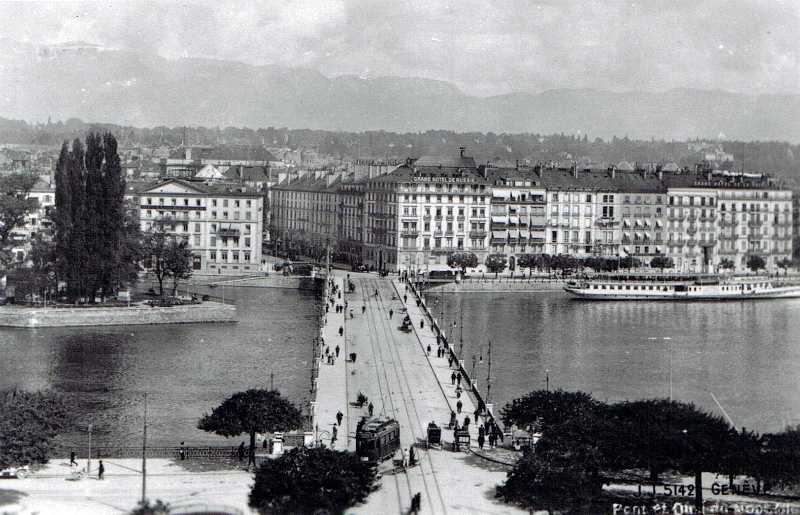 Geneva in early 1900s